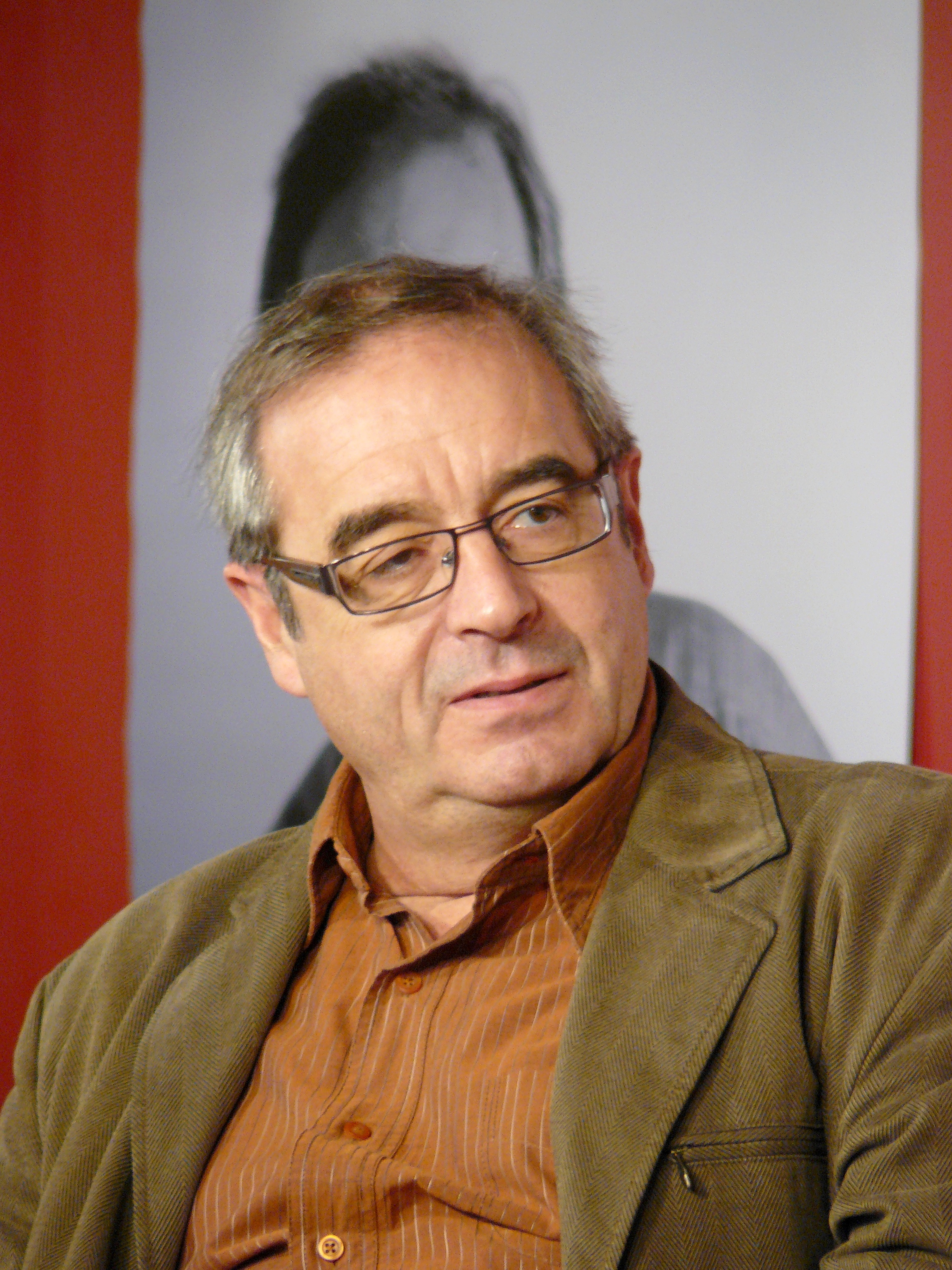 Pascal Picq lors de la présentation de son livre Il était une fois la paléoanthropologie à la FNAC Montparnasse le 2 novembre 2010.